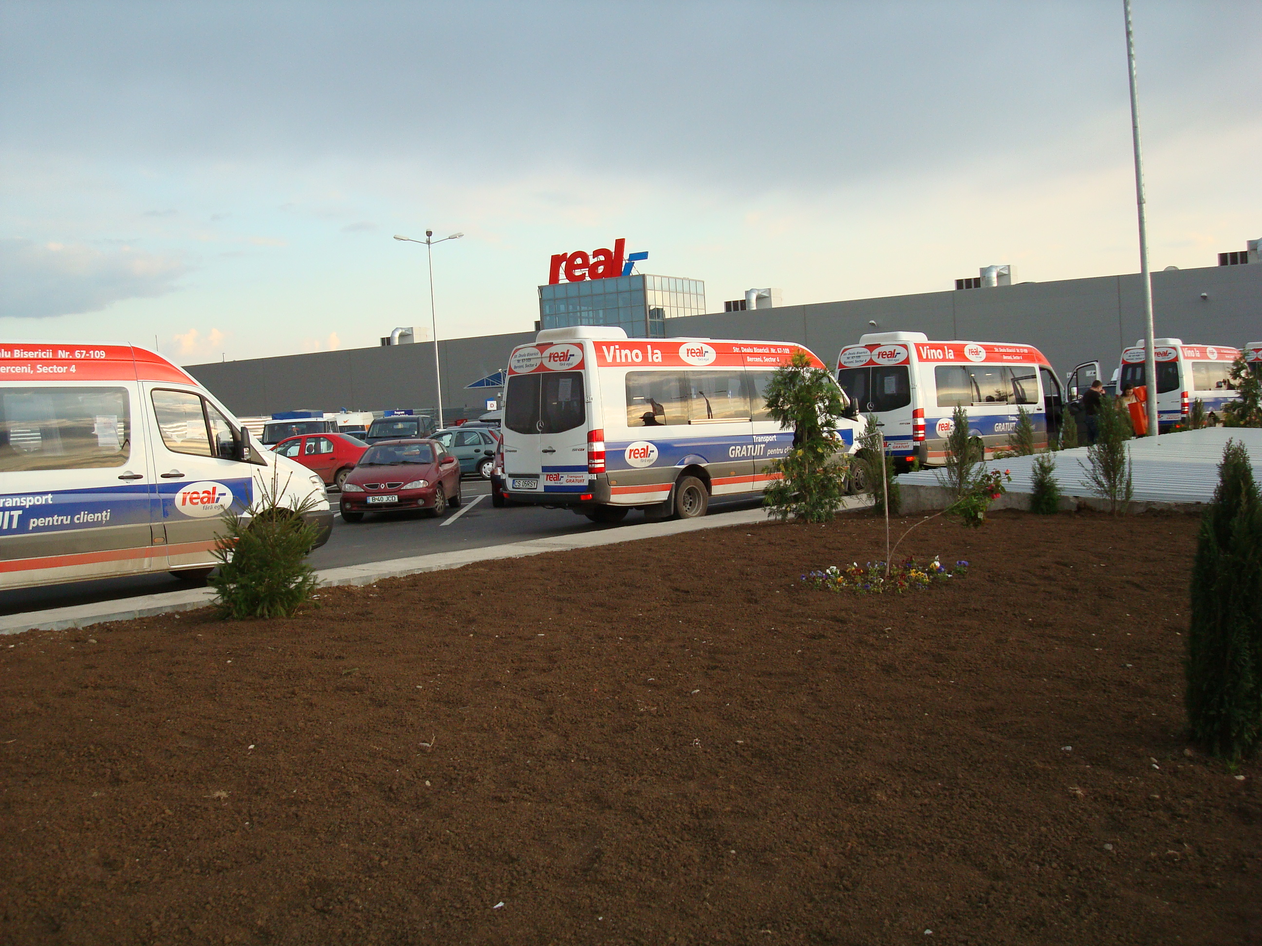 Sector 4, Bucharest, Romania